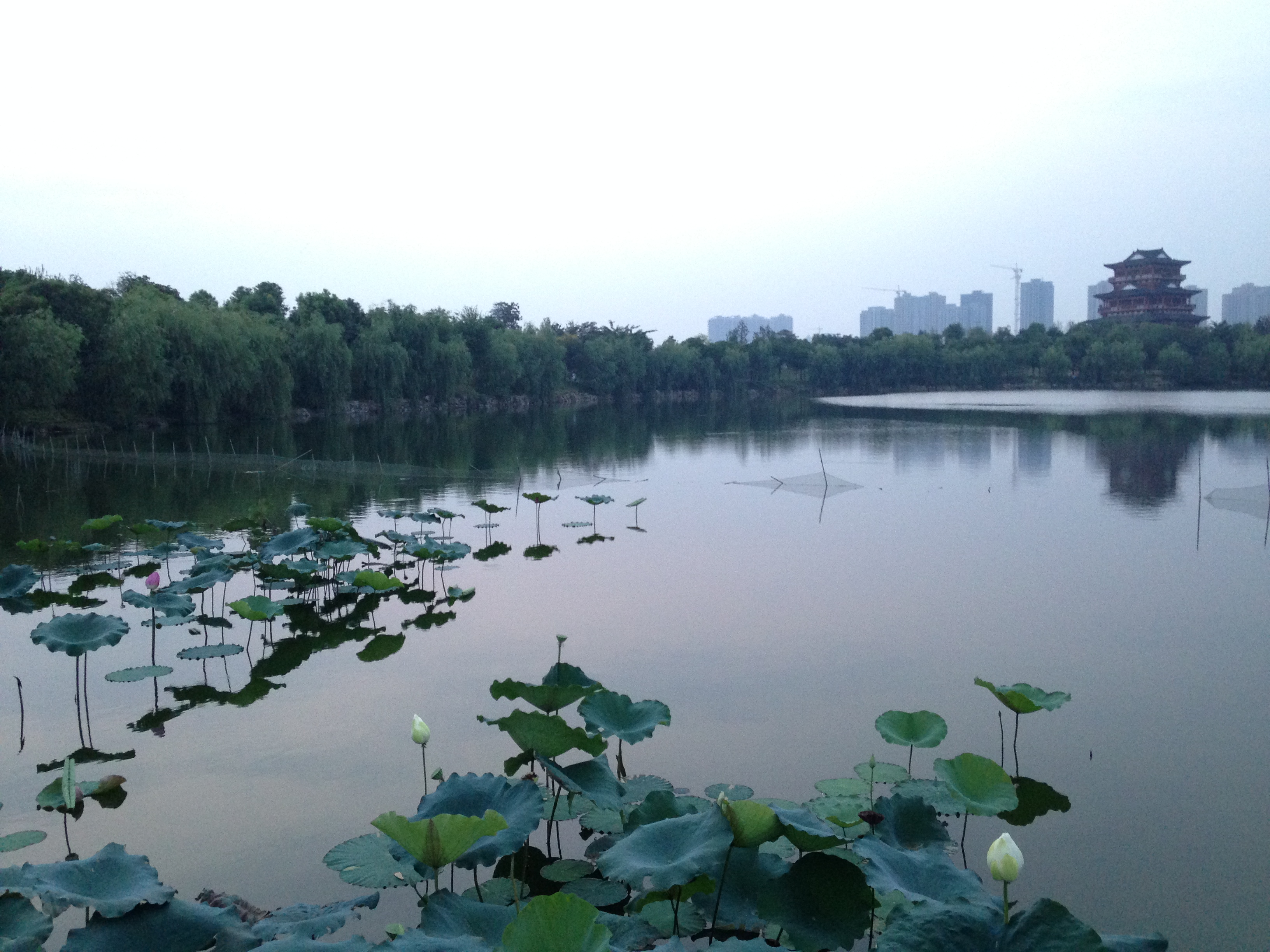 中国湖北省黄岡市黄州区・遺愛湖で咲いているハス